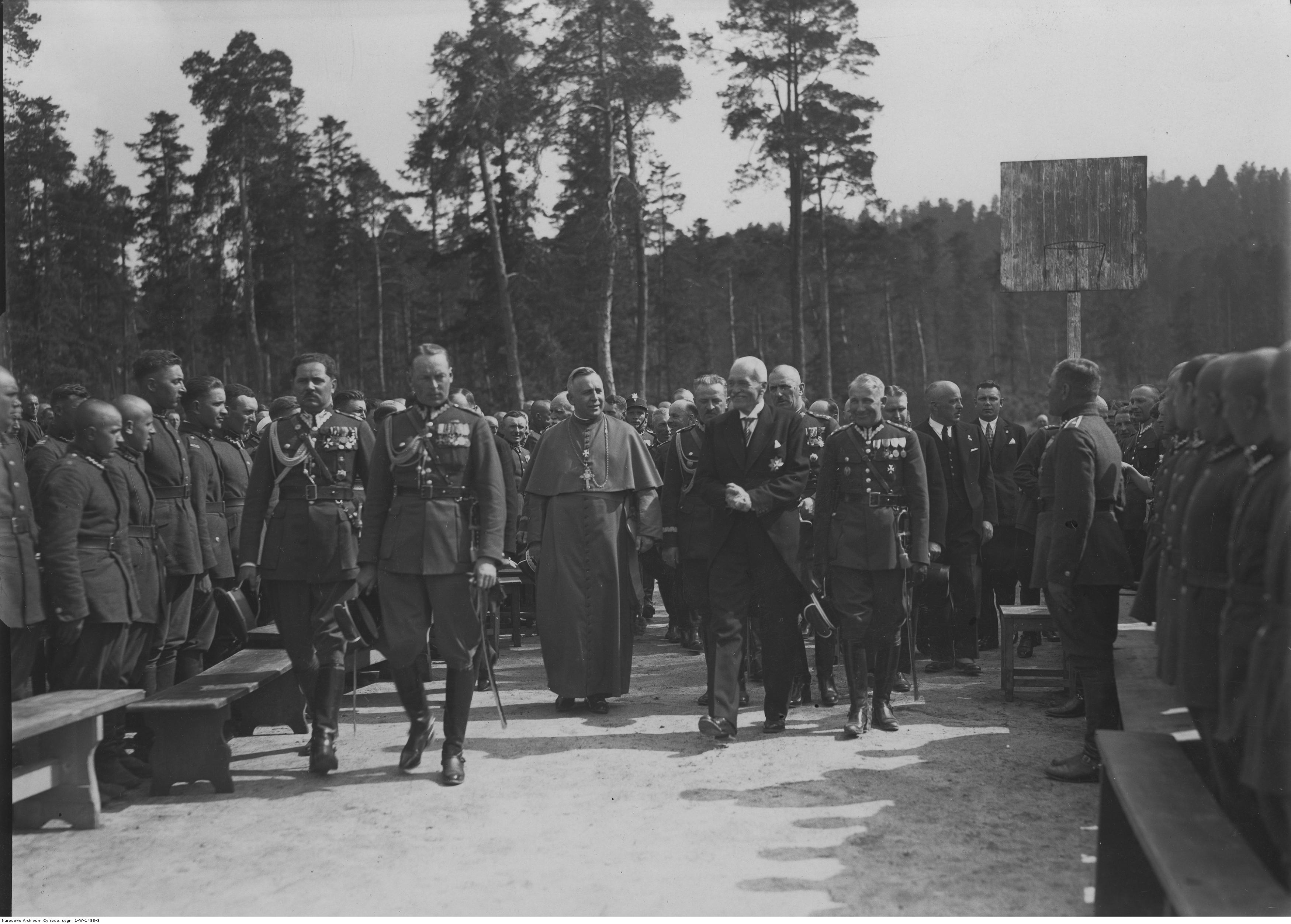 XV - lecie 2 Pułku Artylerii Lekkiej w Kielcach; 12 czerwiec 1933 r. Prezydent RP Ignacy Mościcki w towarzystwie biskupa polowego WP Józefa Gawliny w drodze na żołnierski obiad. Widoczny wojewoda kielecki Jerzy Paciorkowski. Od lewej idą m.in.: mjr Kazimierz Jurgielewicz (1.), kpt. Zygmunt Gużewski (2.), gen. Janusz Głuchowski (na lewo za prezydentem Mościckim), płk Jan Głogowski (na prawo za Prezydentem). Koncern Ilustrowany Kurier Codzienny - Archiwum Ilustracji. Sygnatura: 1-W-1488-3